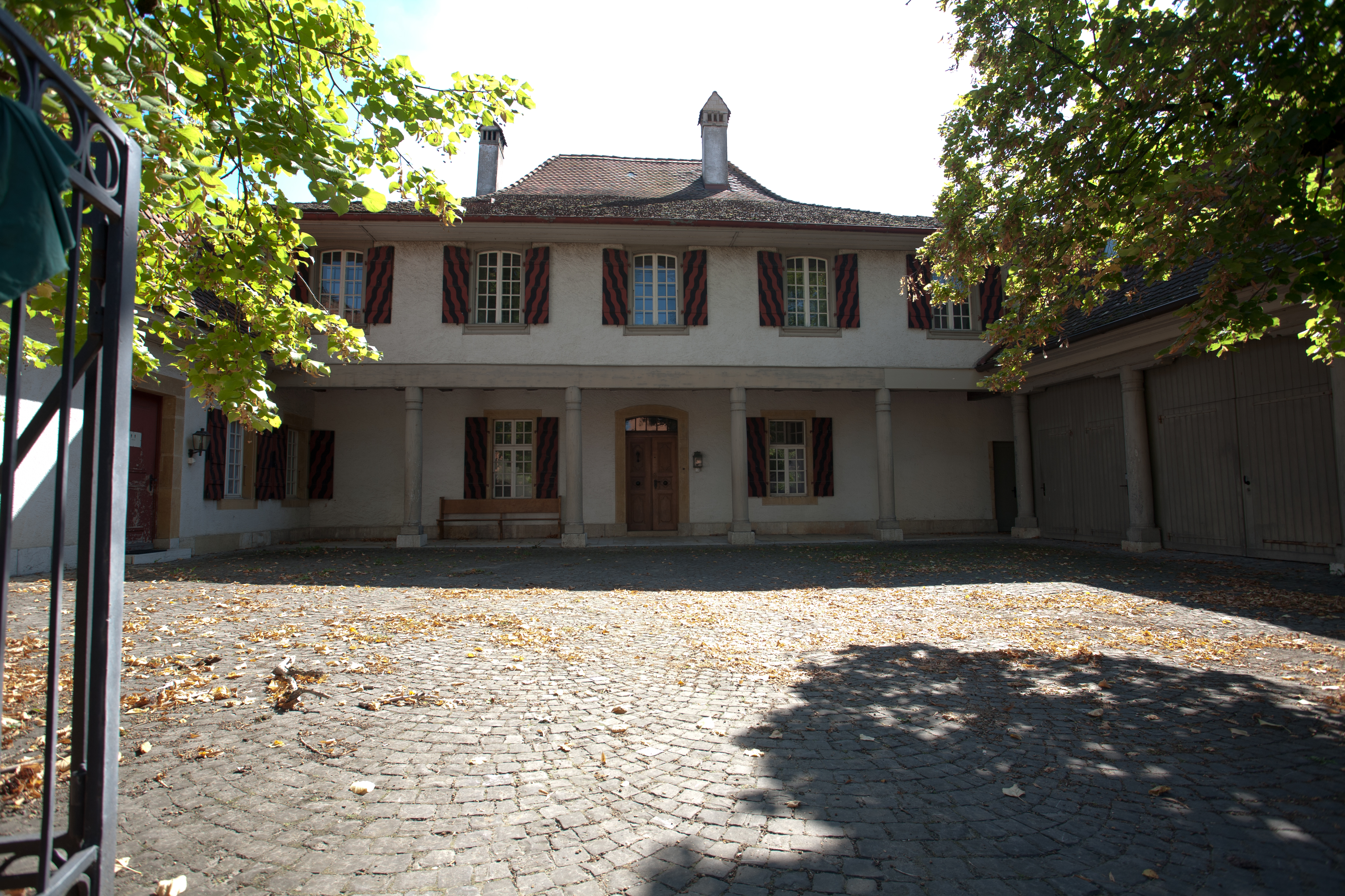 Pfarrhaus in Siselen